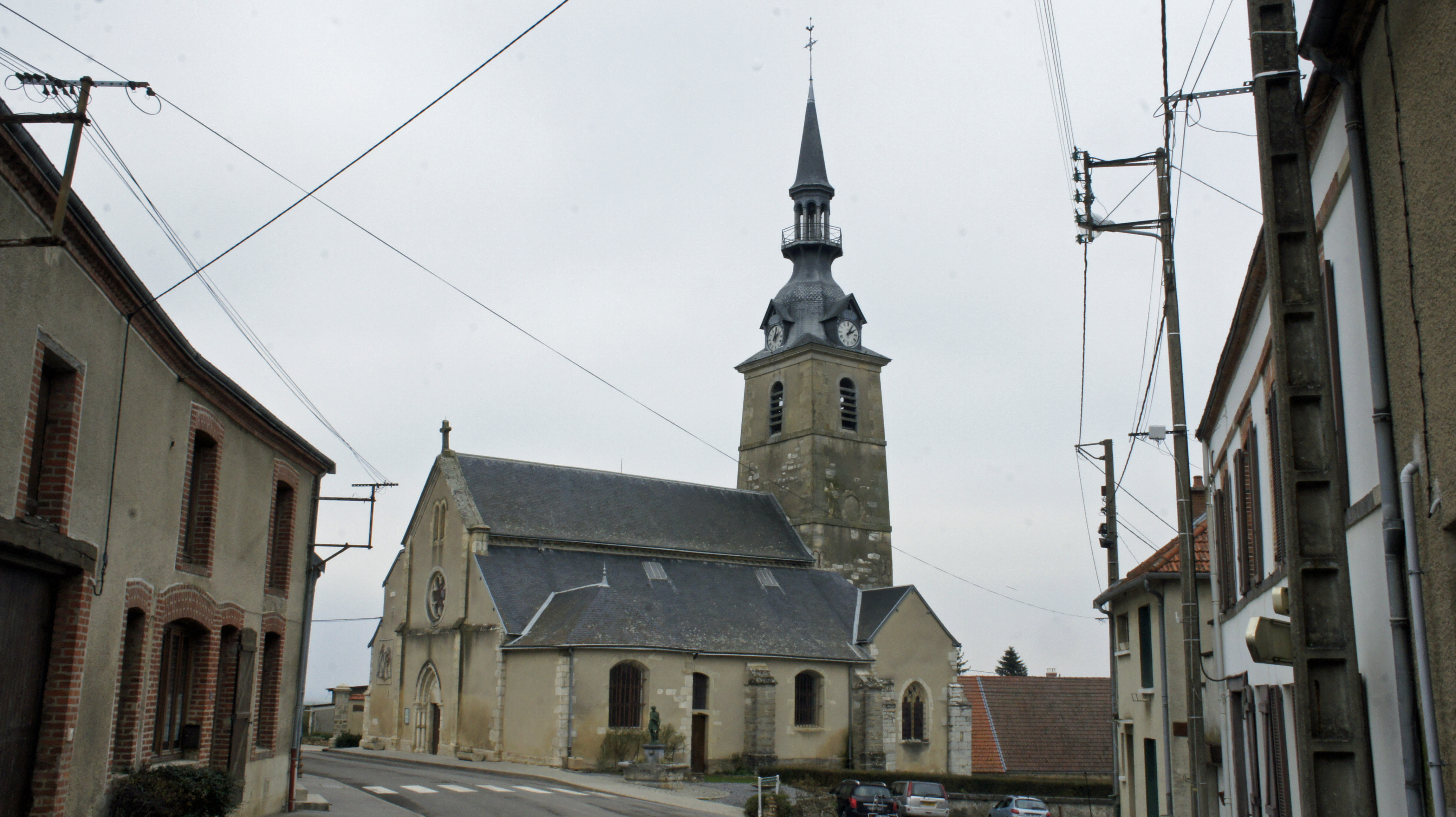 Vers l'église ; fontaine et monumnet aux morts .